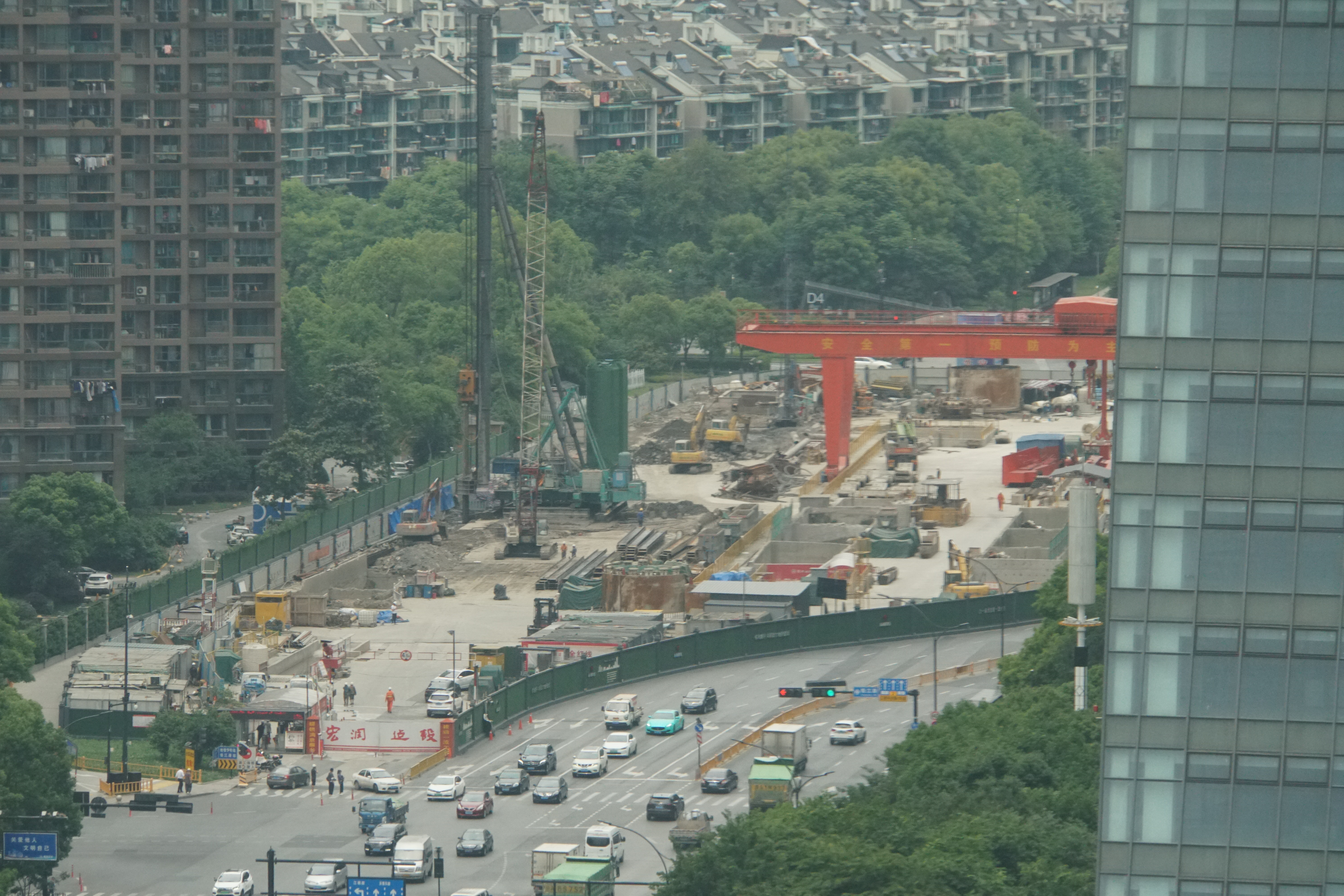 20200508钱江路站工地